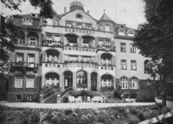 Das Marinekurlazarett Bad Kissingen im Jahr 1936, damals Kurhaus Der Buchenhof genannt.